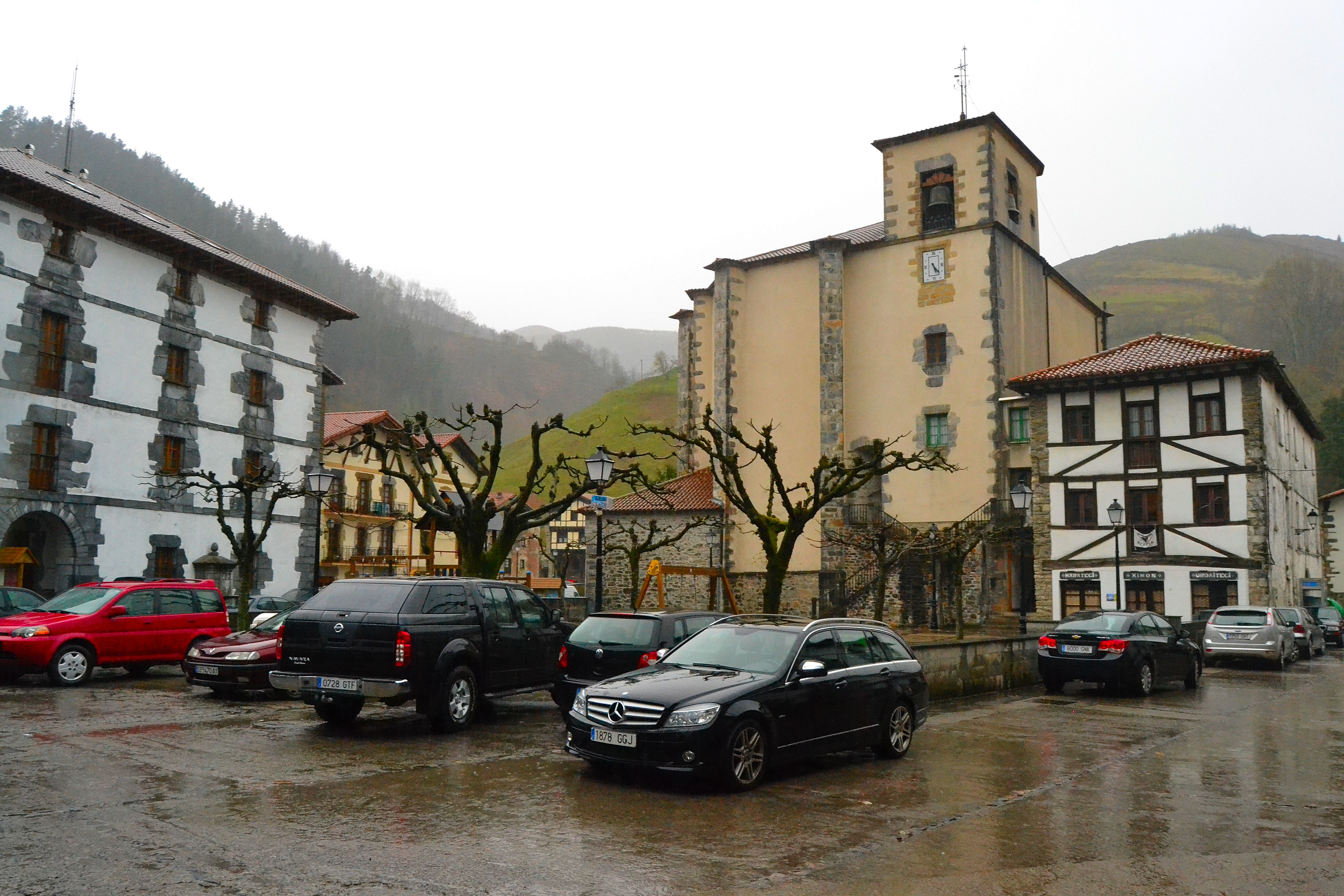 Goizuetako eliza. Nafarroa, Euskal Herria. Church of Goizueta. Navarre, Basque Country.